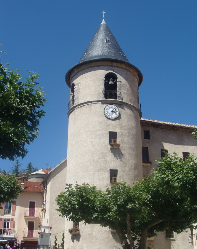 La tour de l'hôtel de ville de Veynes